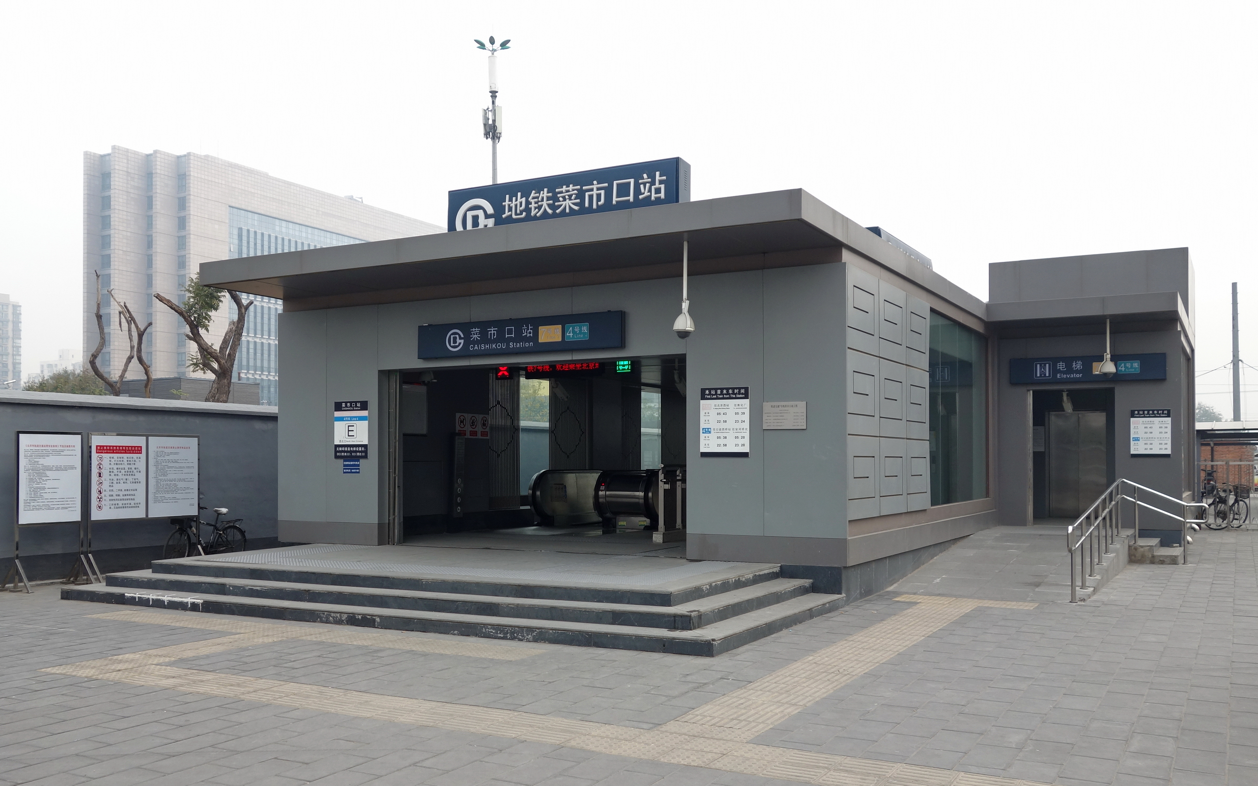 北京地铁4号线/7号线菜市口站E出入口